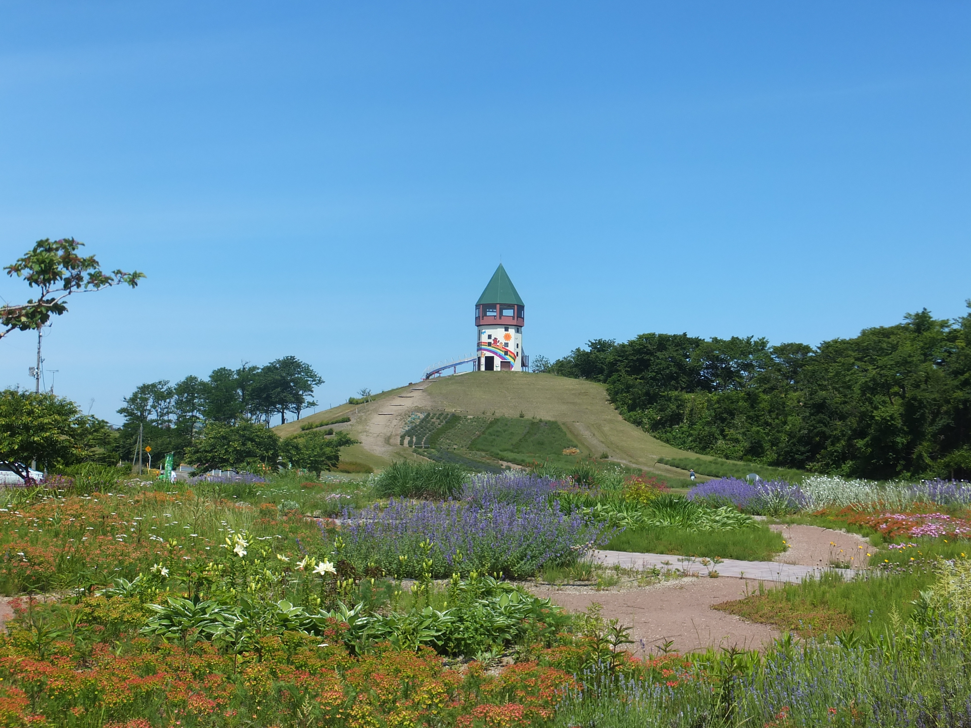 秋田県八峰町の観光施設「ポンポコ山公園」。旧峰浜村時代の1985年、村の商工会青年部が中心となって「ポンポコ山タヌキ共和国」を建国。以来村の観光の拠点として整備が進められてきた。後に近接して道の駅みねはまも設置されている。